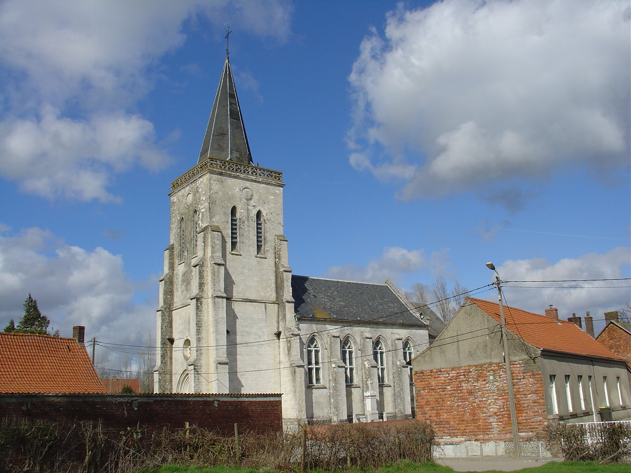 Église de Boisdinghem